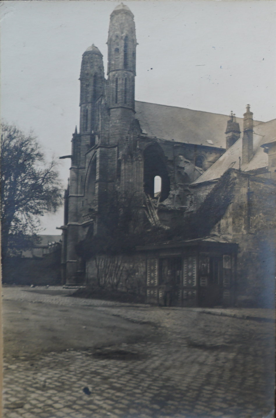 sur une vue ancienne.